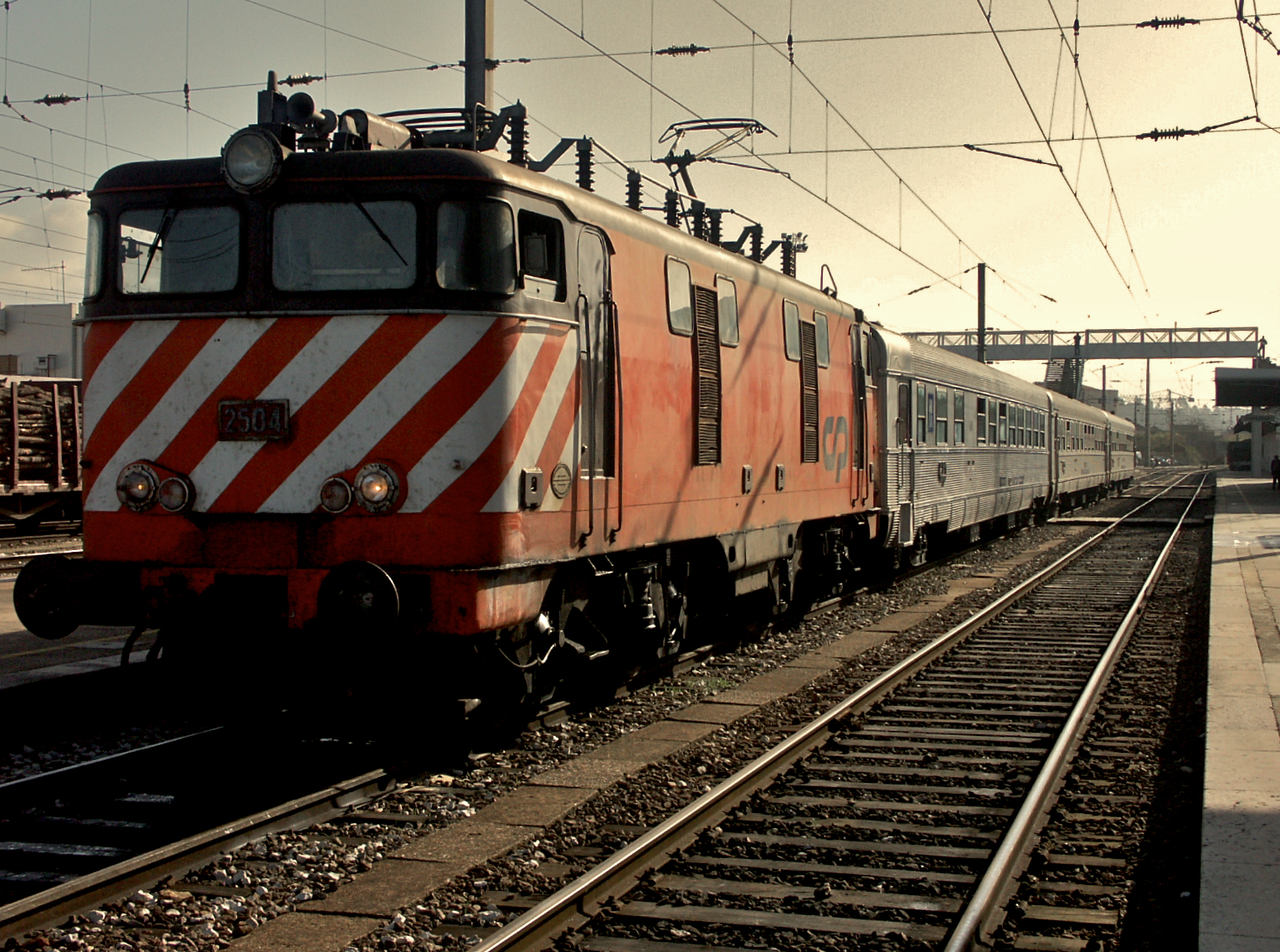 Tipo: Comboio Especial da APAC * [Pampilhosa - Vilar Formoso - Figueira da Foz] Local: Estação da Pampilhosa [Linha do Norte, PK 231 • Linha da Beira Alta, PK 50] Data e hora: 8 de Dezembro de 2007 [11h03] Material: Locomotiva 2504 + 3 carruagens Sorefame por ocasião dos 125 anos da Linha da Beira Alta (1882-2007) e dos 50 anos de serviço comercial das Locomotivas Eléctricas 2500 (1957-2007).